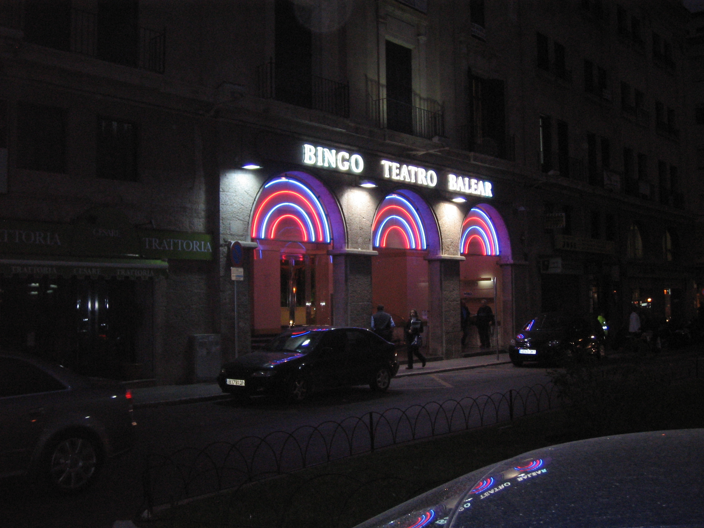 Bingo Teatro Balear en Palma de Mallorca.